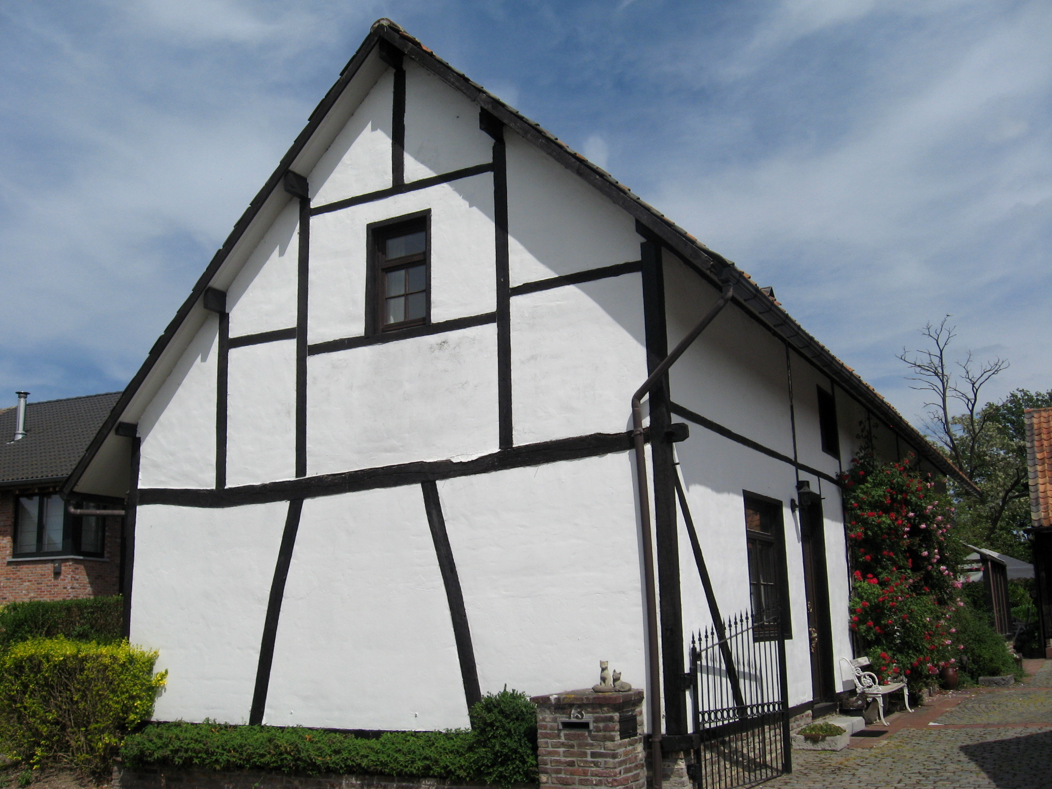 Hoeve met losse bestanddelen, Kattendansstraat 73 in Sint-Lambrechts-Herk